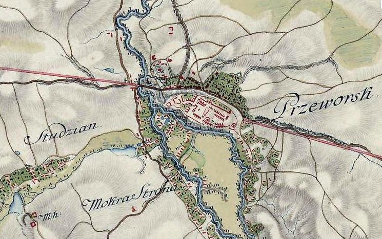 1. Militärische Aufnahme (-1772)